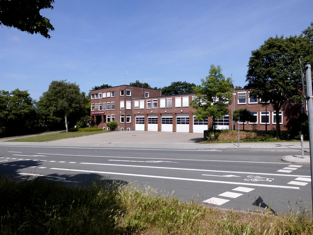 Feuerwache Kiel-Ost, Röntgenstraße 11, 24143 Kiel